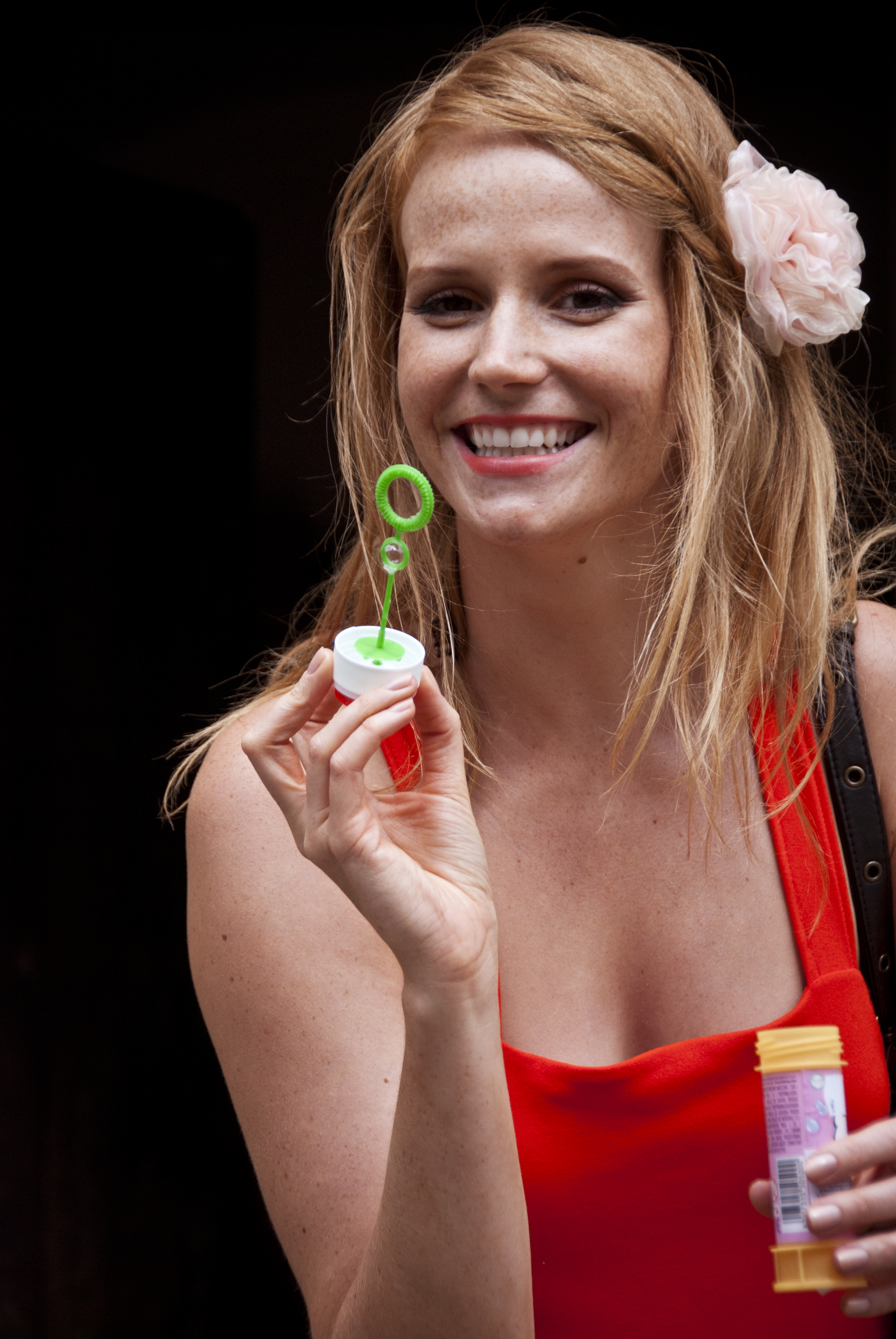 Eva Sakálová